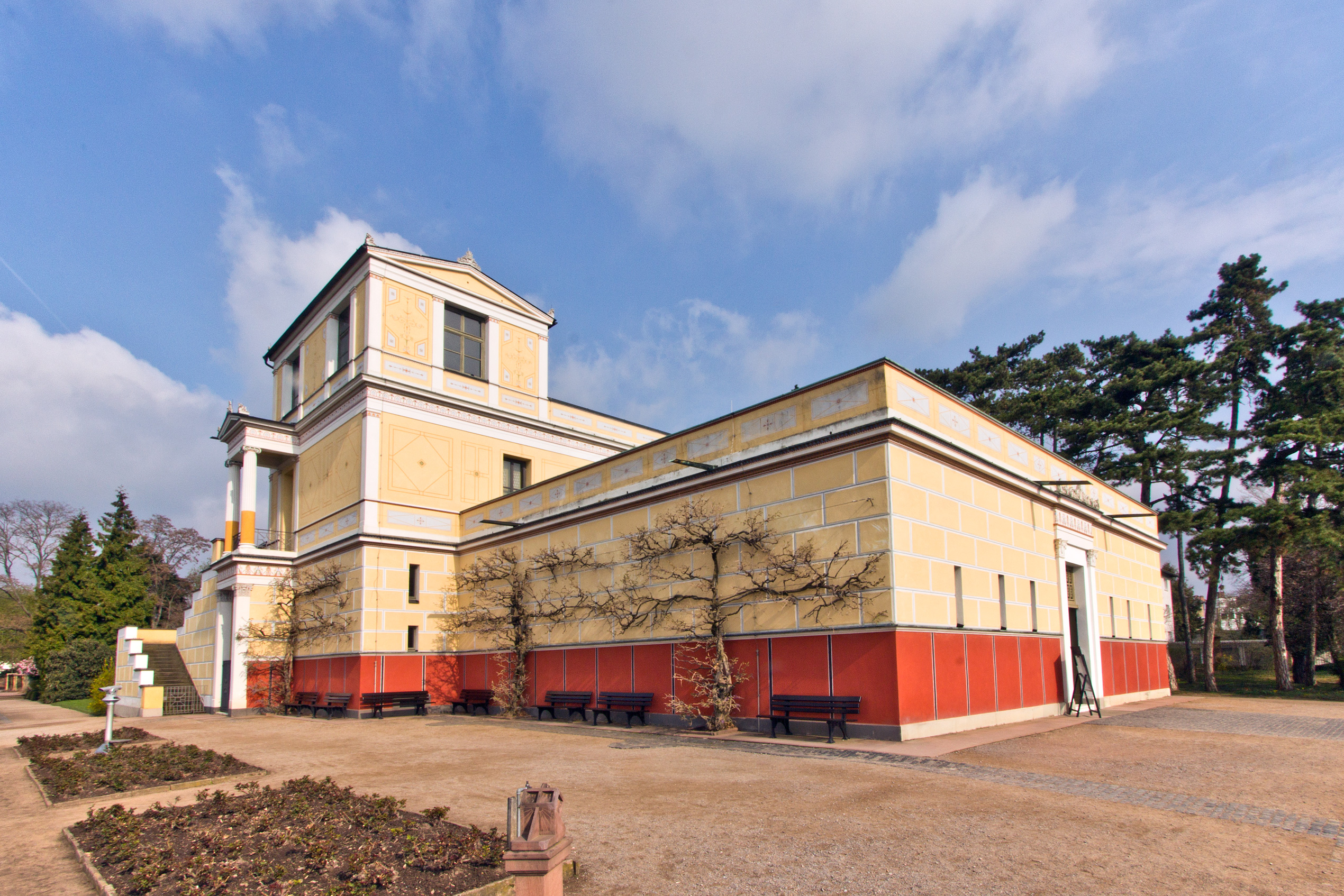 Pompejanums in Aschaffenburg (Bayern - Deutschland).